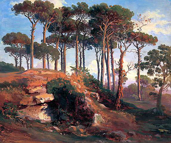 Johann Jakob Frey, Pinien am Nemi-See (um 1840)